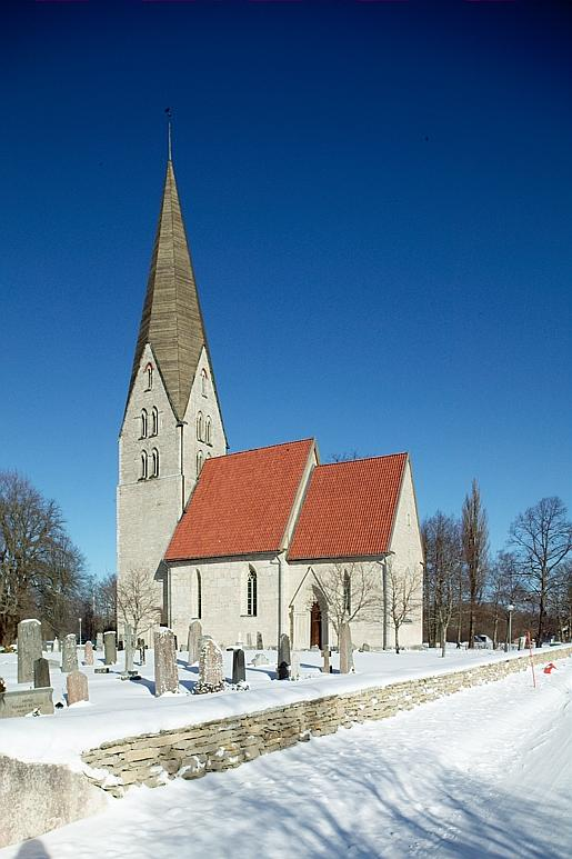 Kyrkan från söder Motiv: Klinte kyrka Nyckelord: Riksintressen, Vintermotiv Kategori: (01) ExteriörerKyrkan från söder.